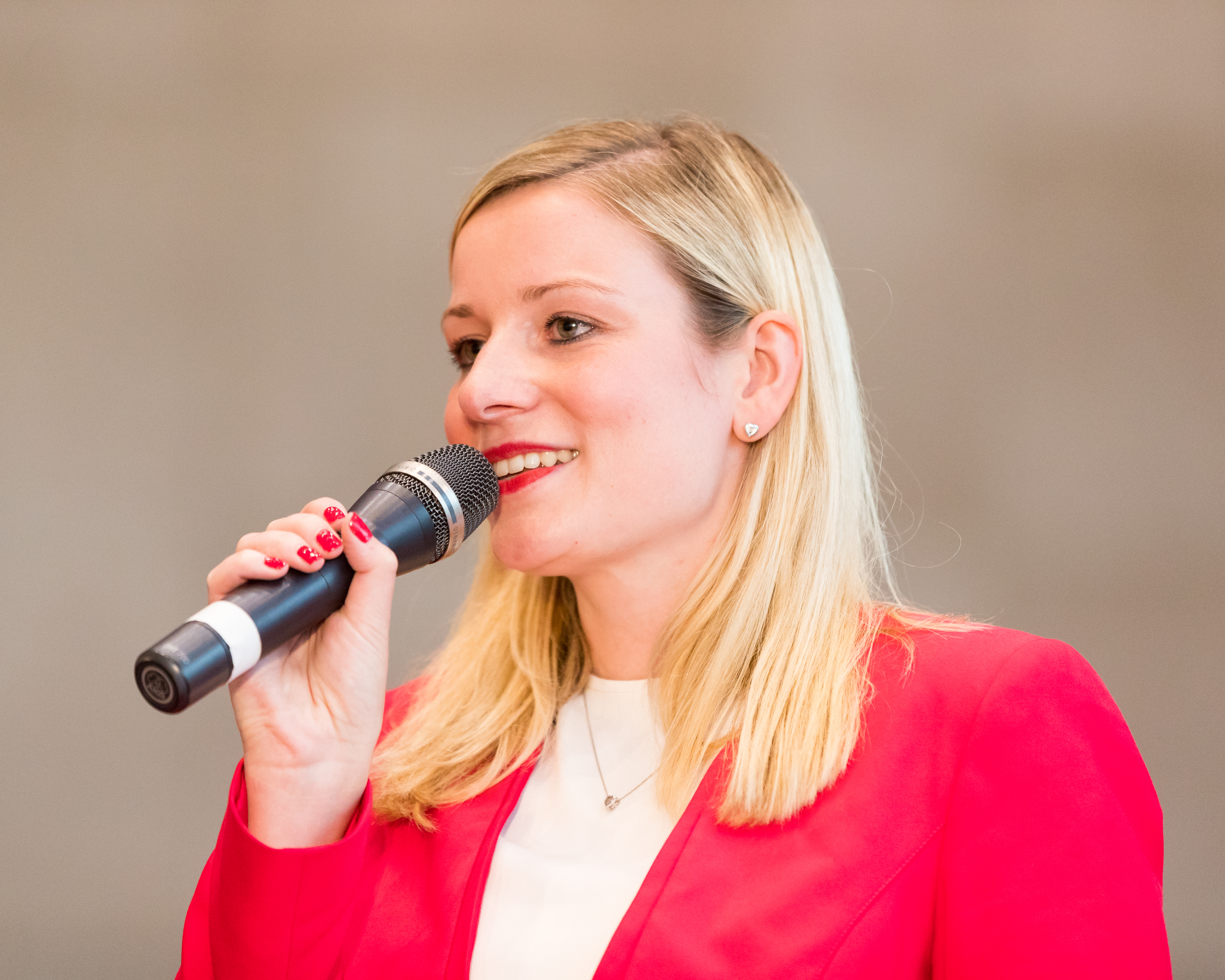 Isabel Mackensen during SPD Wahlkampf Ludwigshafen at Pfalzbau, Ludwigshafen, Rheinland-Pfalz, Germany on 2017-09-13, Photo: Sven Mandel